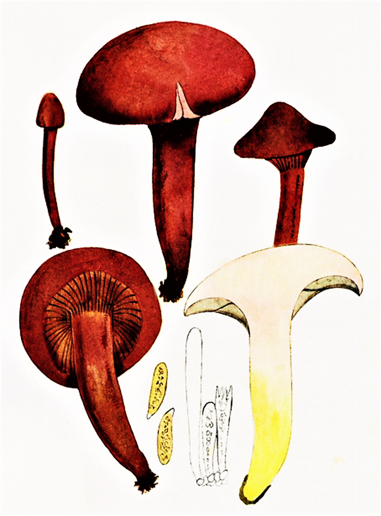 Bres.: Gomphidius viscidus (L., 1753) Elias Magnus Fries (1838) heute Chroogomphus rutilus (Schaeff., 1774) O.K.Miller (1964)